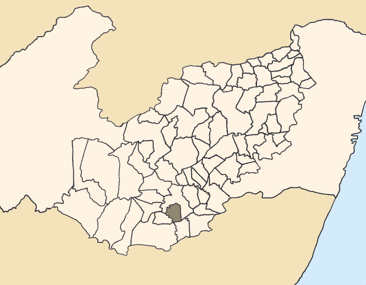 Mapa da mesorregião Agreste de Pernambuco (Brasil) subdivida em municípios. Em destaque, o município de Brejão. Map of the brazilian state of Pernambuco (mesorregião Agreste) showing the city of Brejão. Imagem tratada com o GIMP. Image made with GIMP.